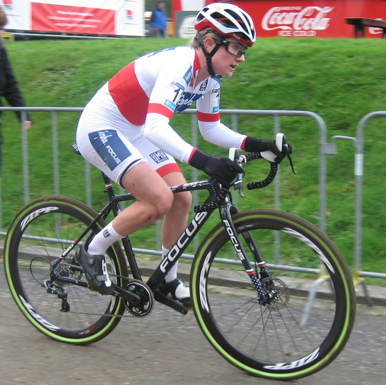 Ellen Noble in de wereldbeker veldrijden op de Cauberg in Valkenburg, Nederland, op zondag 23 oktober 2016.